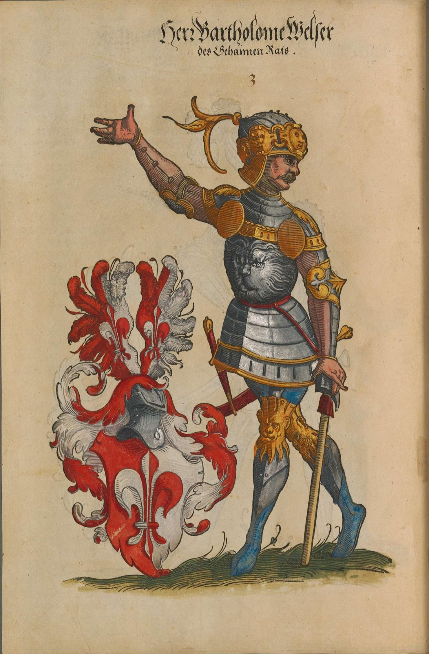 Abbildung von Bartholomäus V. Welser im Geschlechterbuch der Stadt Augsburg